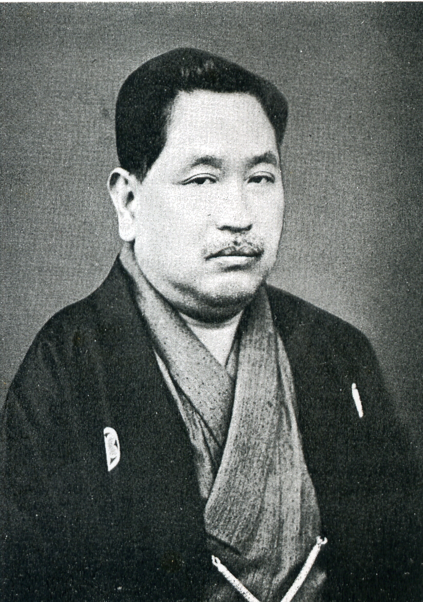 この写真は、野方次郎の写真です。